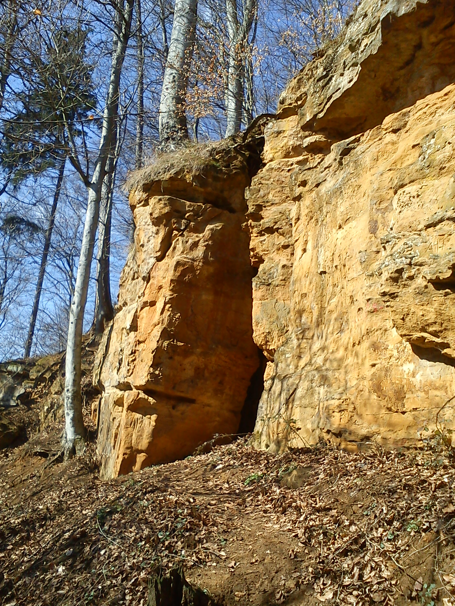 Höhle Teufelskeller am Buchberg, K 29